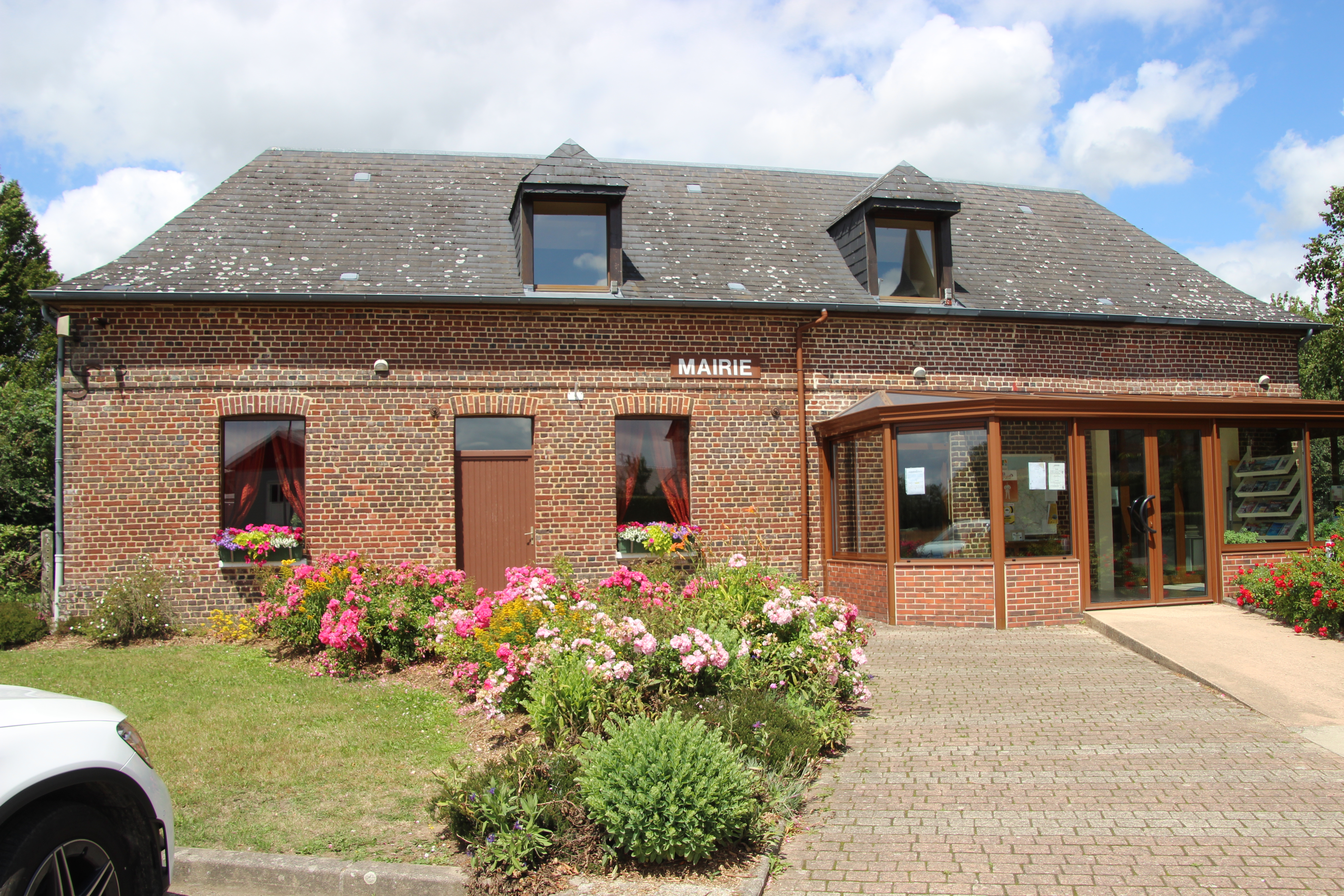 Pierreval